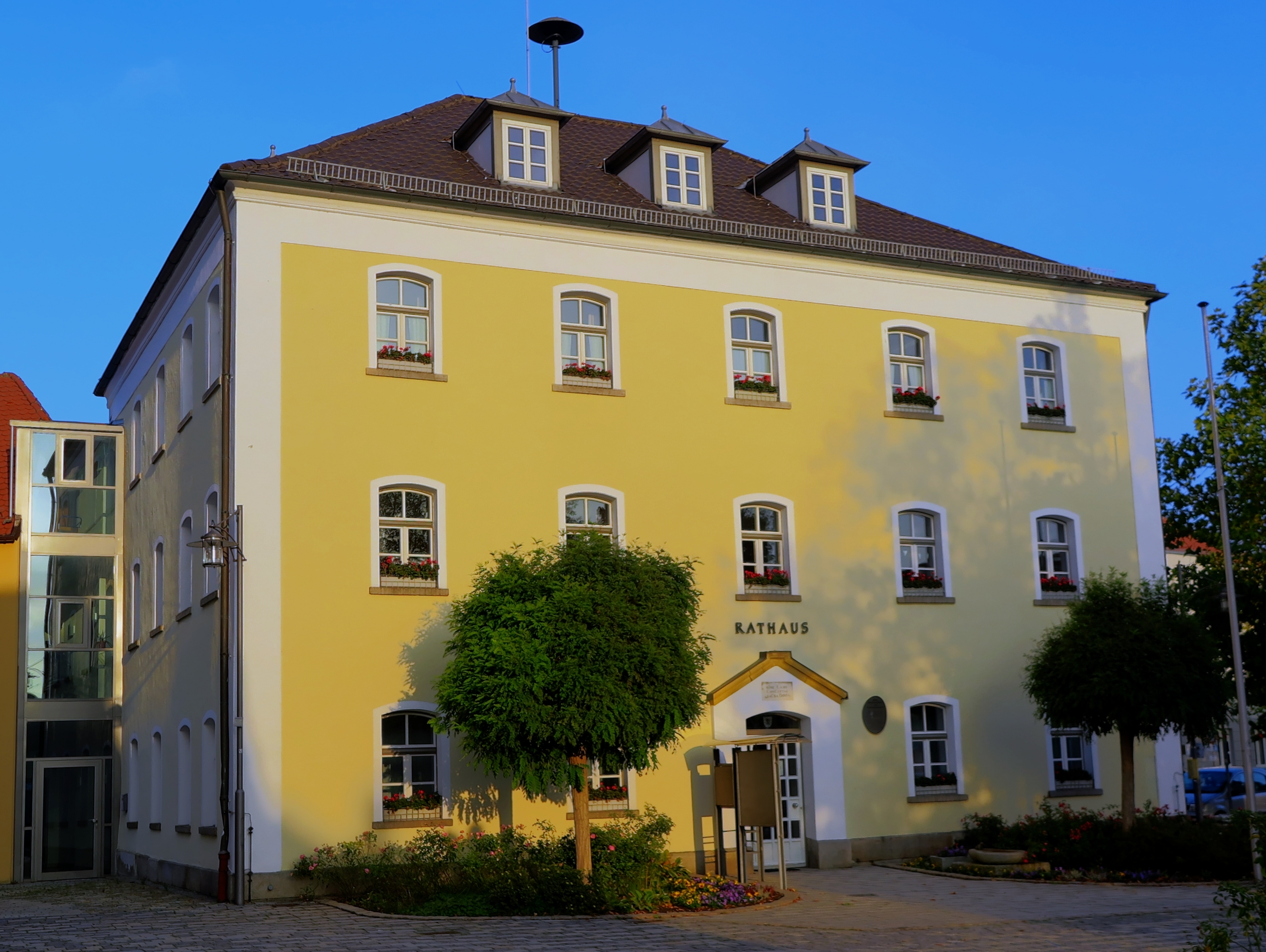 Deutschland, Bayern, Oberfalz, Landkreis Schwandorf, Gemeinde Pfreimd, Rathaus